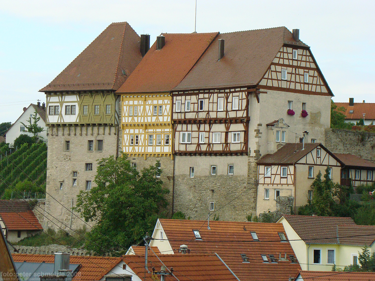 Oberes Schloss in Talheim (Lkr. Heilbronn)